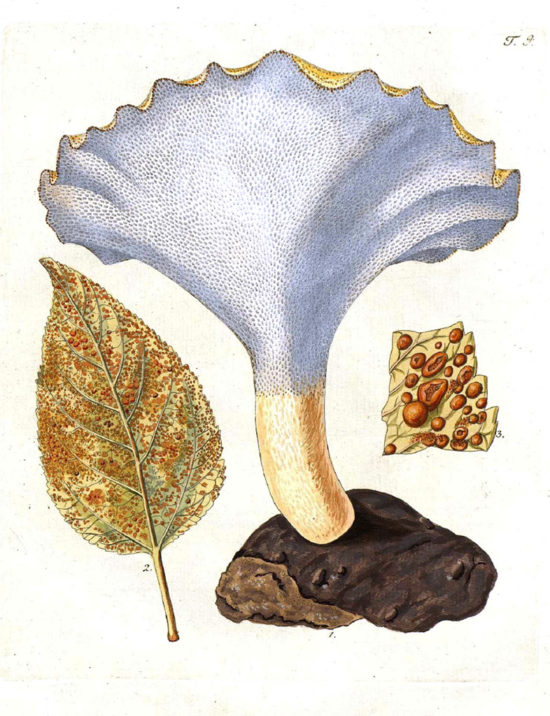 Rycina Polyporus tuberaster z "Collectaneorum supplementum" N. Jacquina (1797)